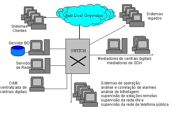 esquema simplificado de equipamentos que podem ser usados na rede de gerência de telecomunicações